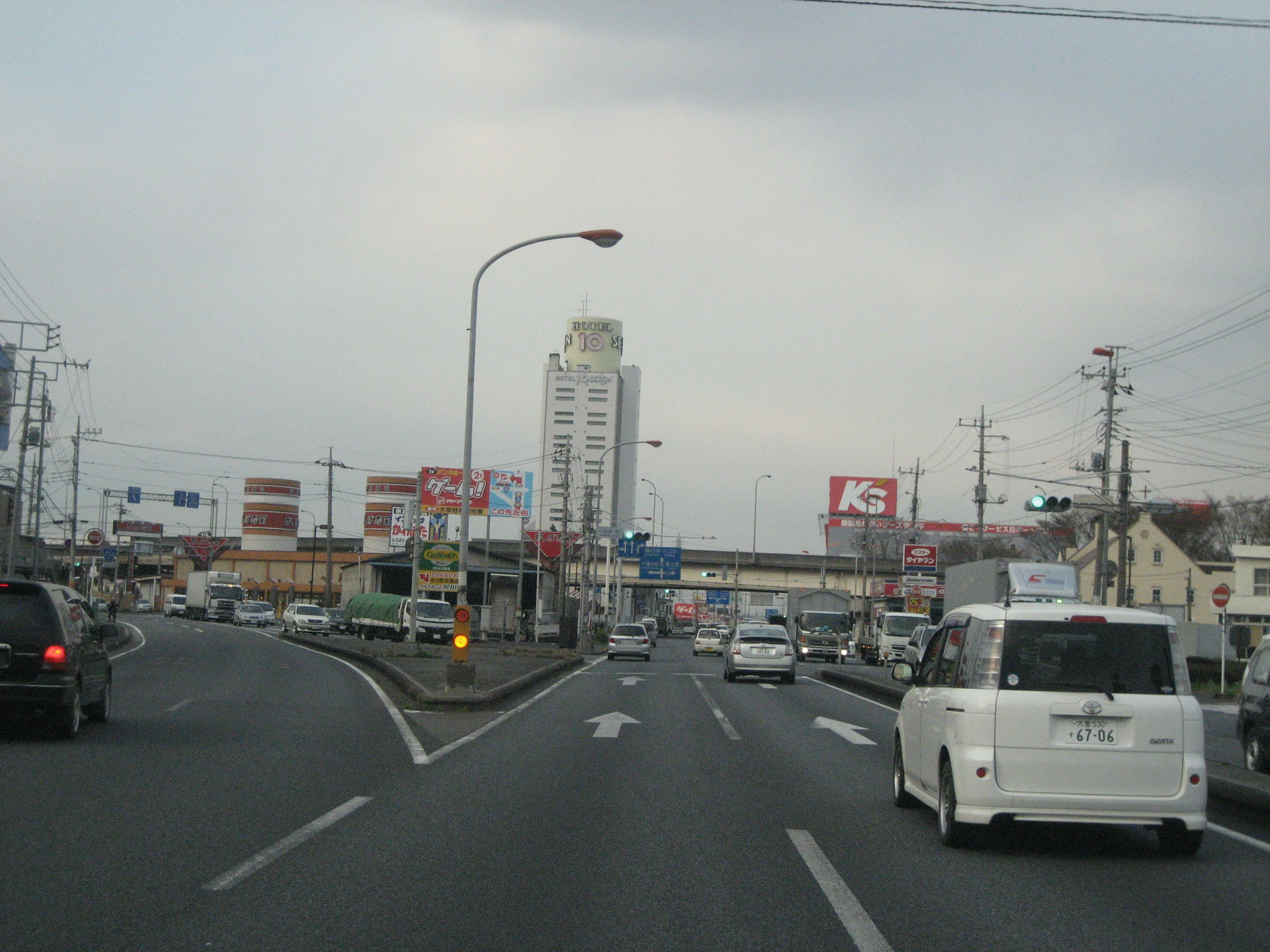 国道16号線 川越市小仙波南付近